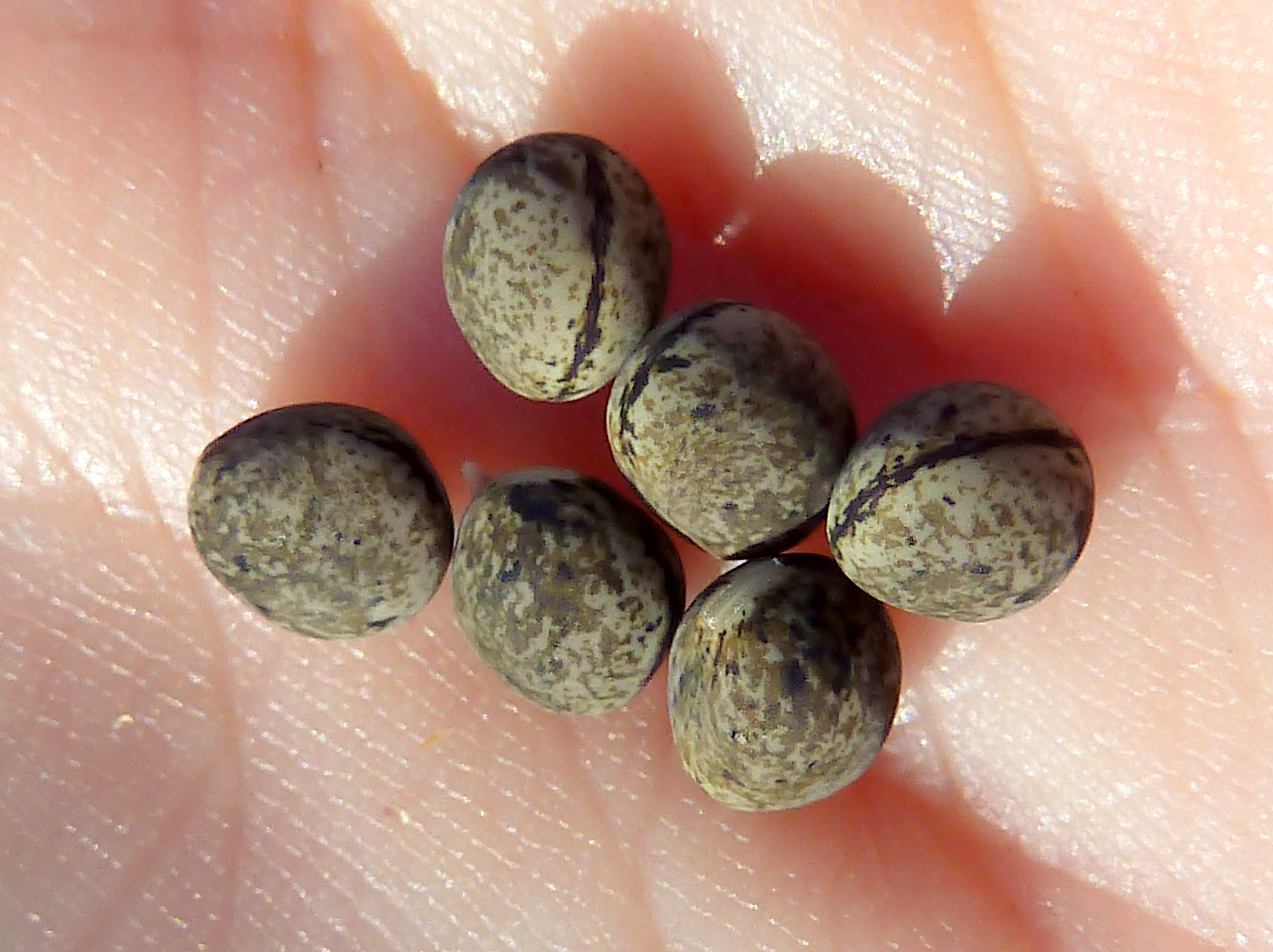 Vicia monantha (Algarroba) - Semillas maduras. - Camino del Canalillo, Albatera (Provincia de Alicante, España).